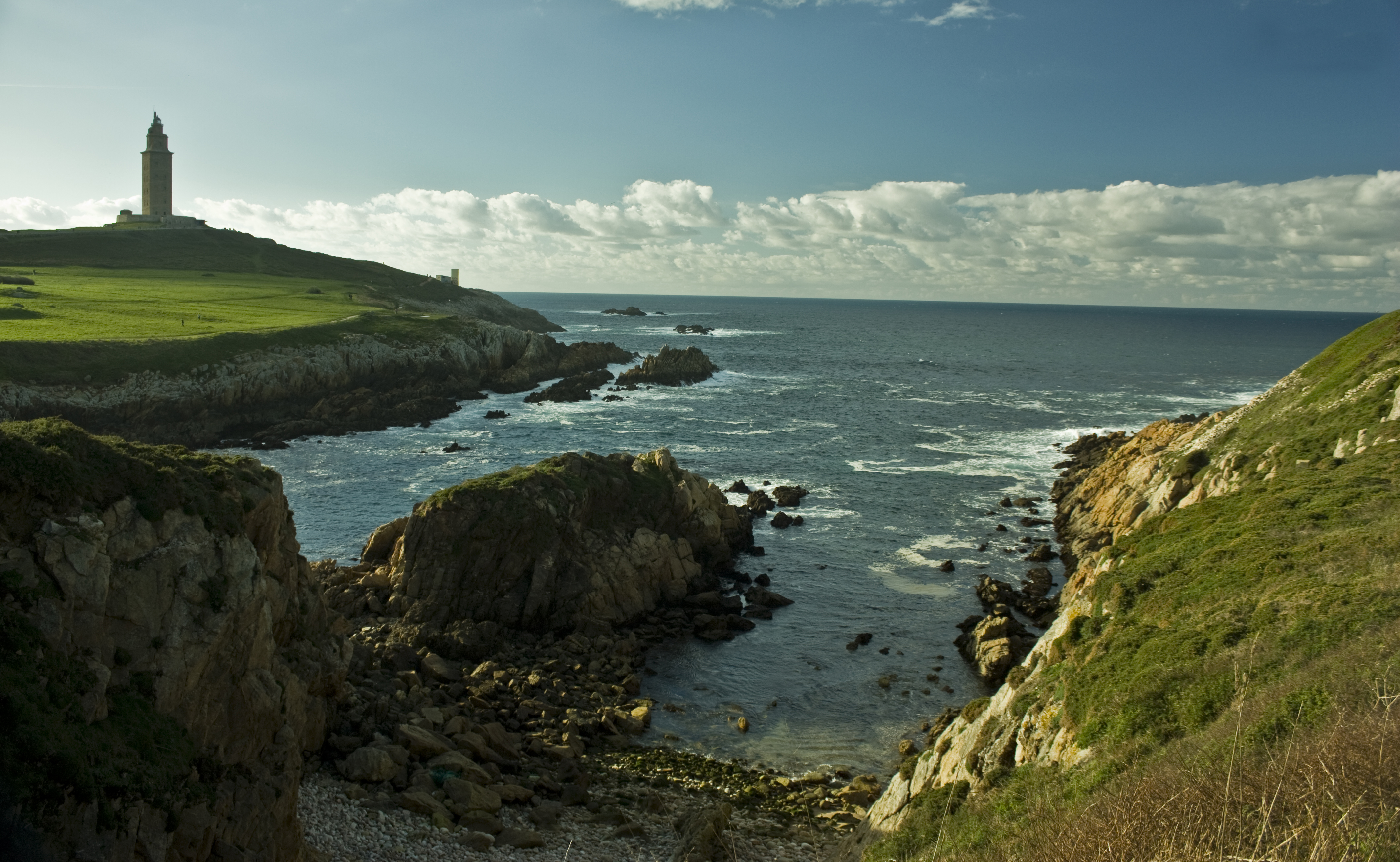 A Coruña, Torre de Hércules, Galiza